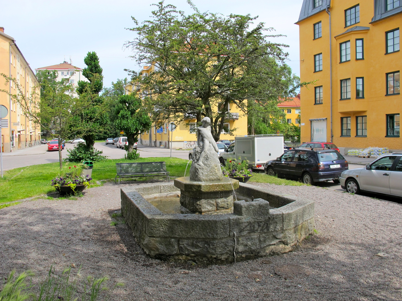 Fontän i Aspudden av Albin Brag